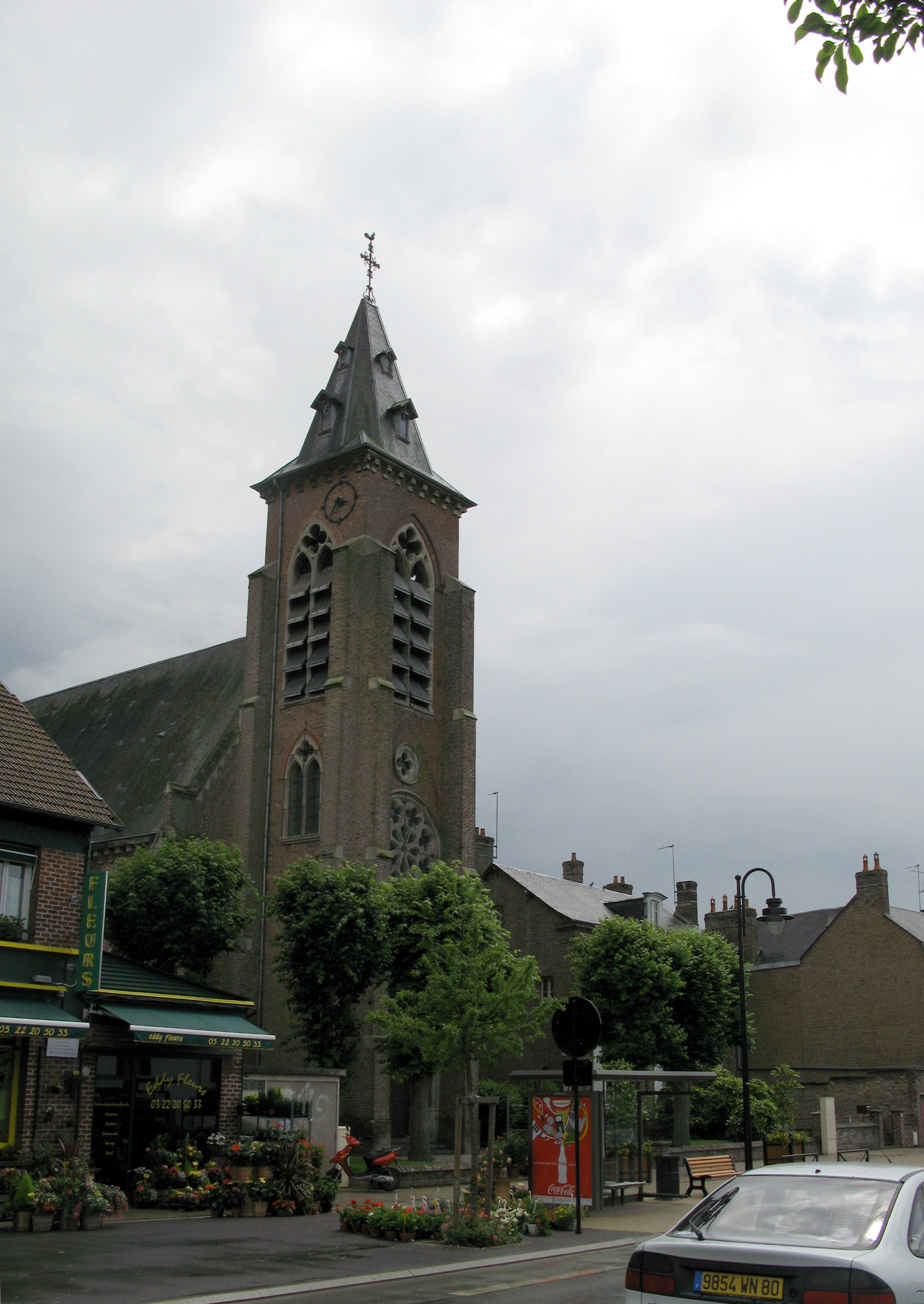 Abbeville (Somme, France) - Eglise St-Jean-Baptiste, dans le quartier de Rouvroy (à l'Ouest d'Abbeville). .